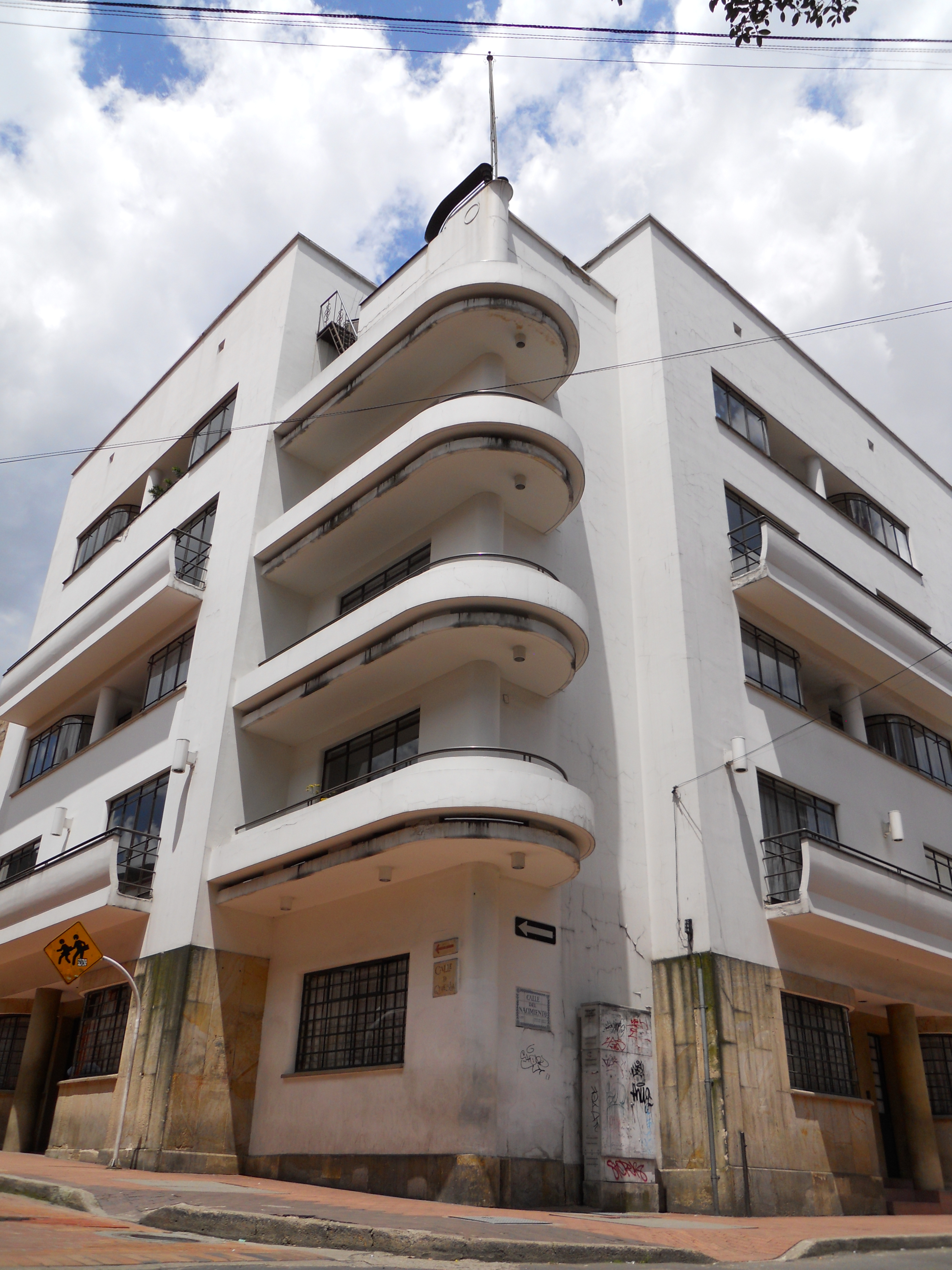 Balcones y mástil del edificio Vengoechea.